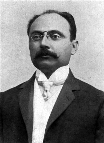 Cecilio Báez González